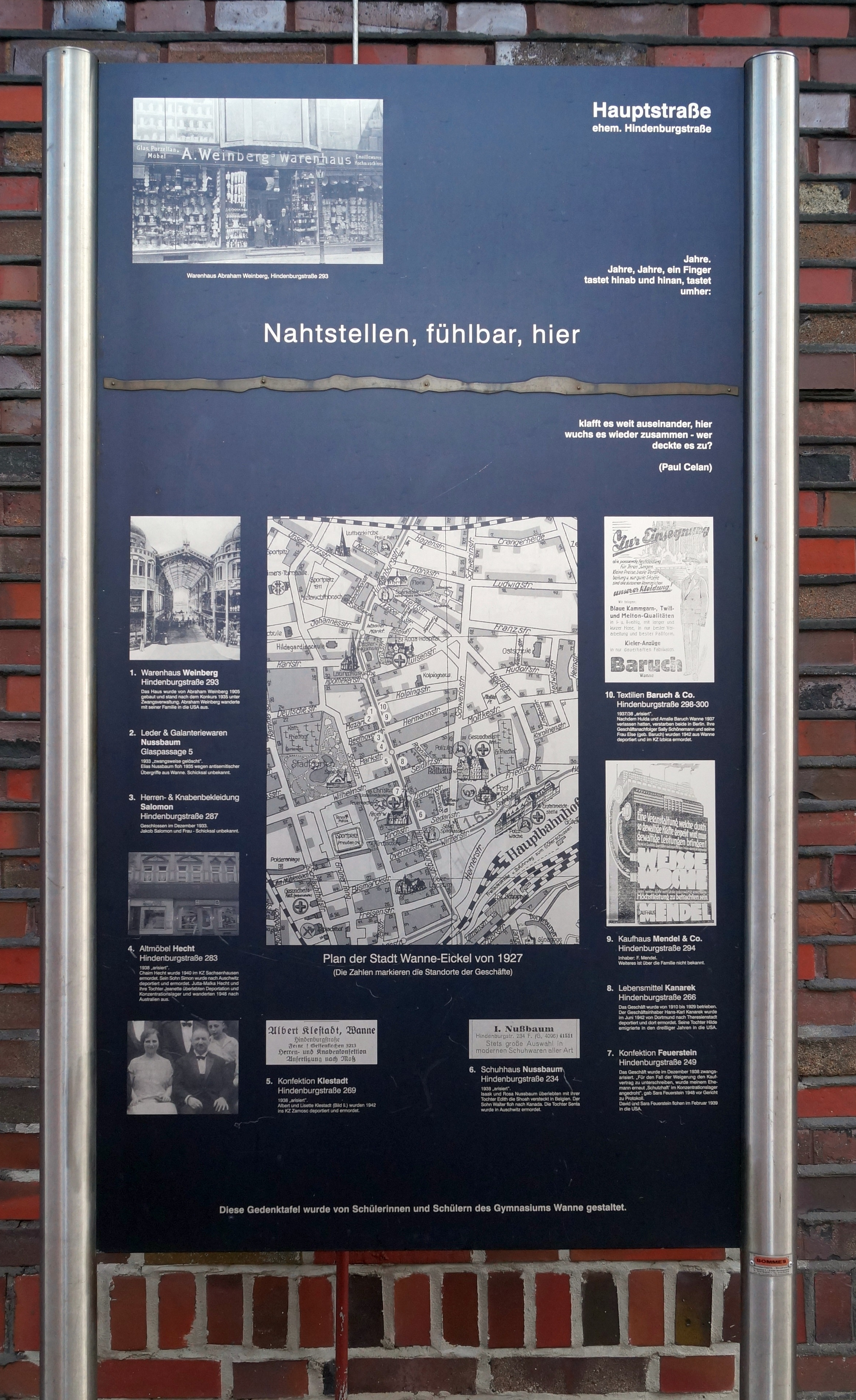 Herne-Wanne Gedenktafel vor der Sparkasse auf Höhe der Hauptstrasse 224. Eingezeichnet sind Geschäfte jüdischer Kaufleute aus Wanne-Eickel im Stadtplan von 1927. Februar 2014